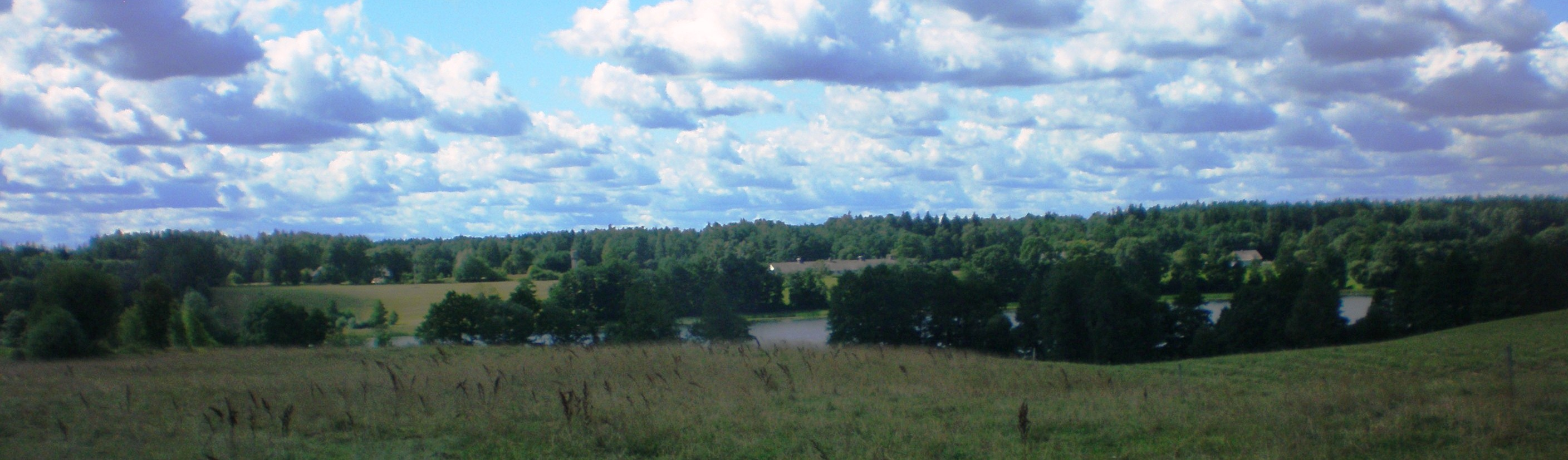 Našio ežeras netoli Antanašės, Rokiškio raj., Lietuva